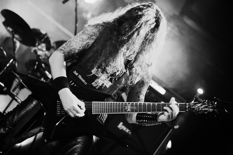 Azarath, Wrocław, Firlej, 6.09.2011